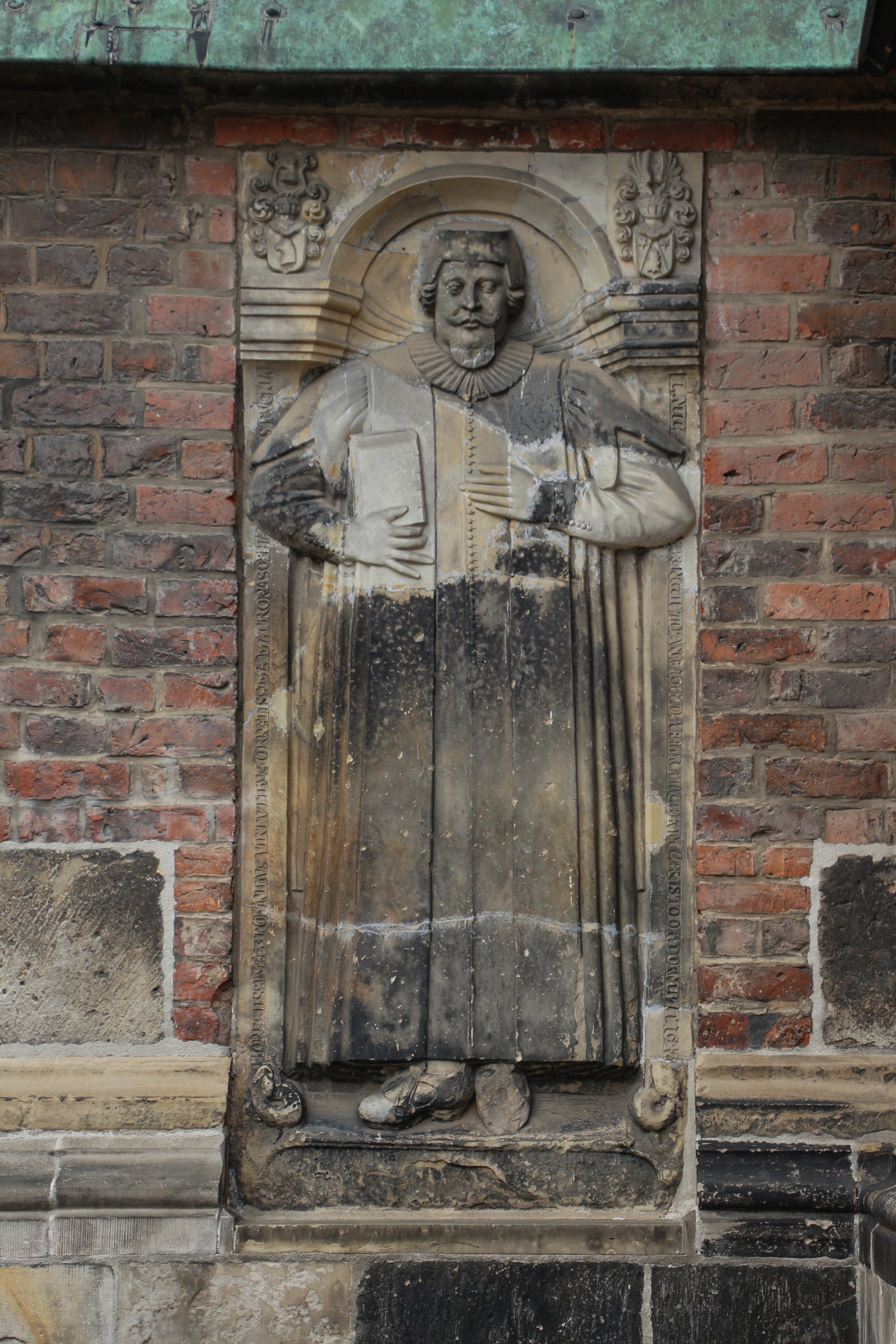 Marktkirche (Hannover), Epitaph für Nikolaus Baring (1607–1648), mit Wappen Baring bzw. Stuke (Ehefrau) (DI 36, Stadt Hannover, Nr. 352 (Sabine Wehking), in: urn:nbn:de:0238-di036g006k0035209.)